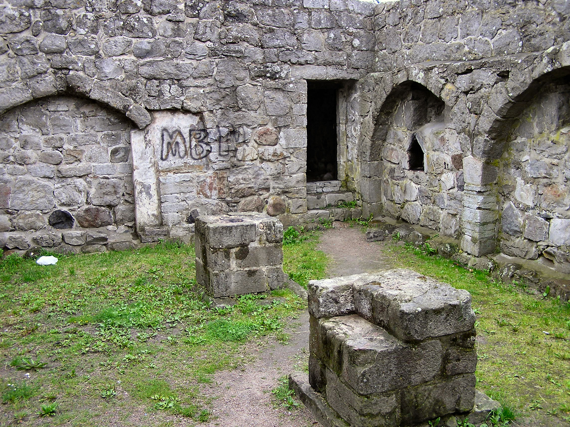 Åhus, ruin af ærkebiskop Eskils borg, 1100-tallet